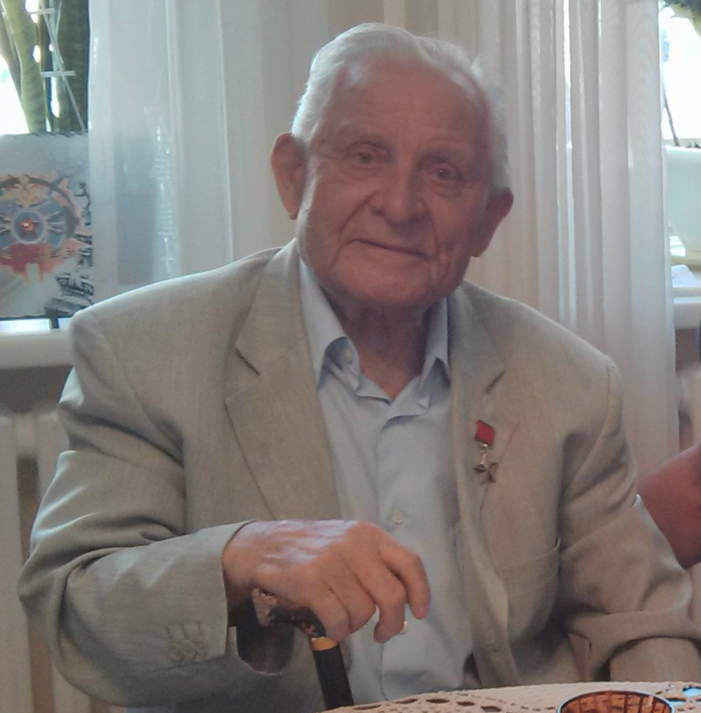 На встрече с Героем России Д. Перминовым